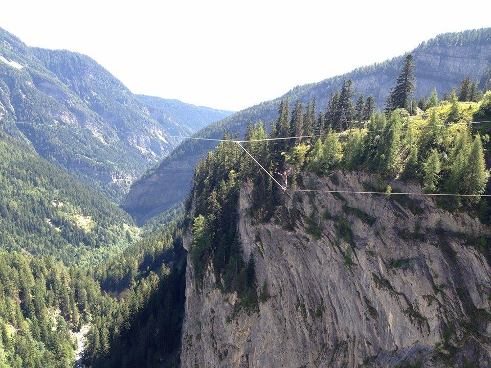 Une high-space-long-line équipée dans les Alpes suisses